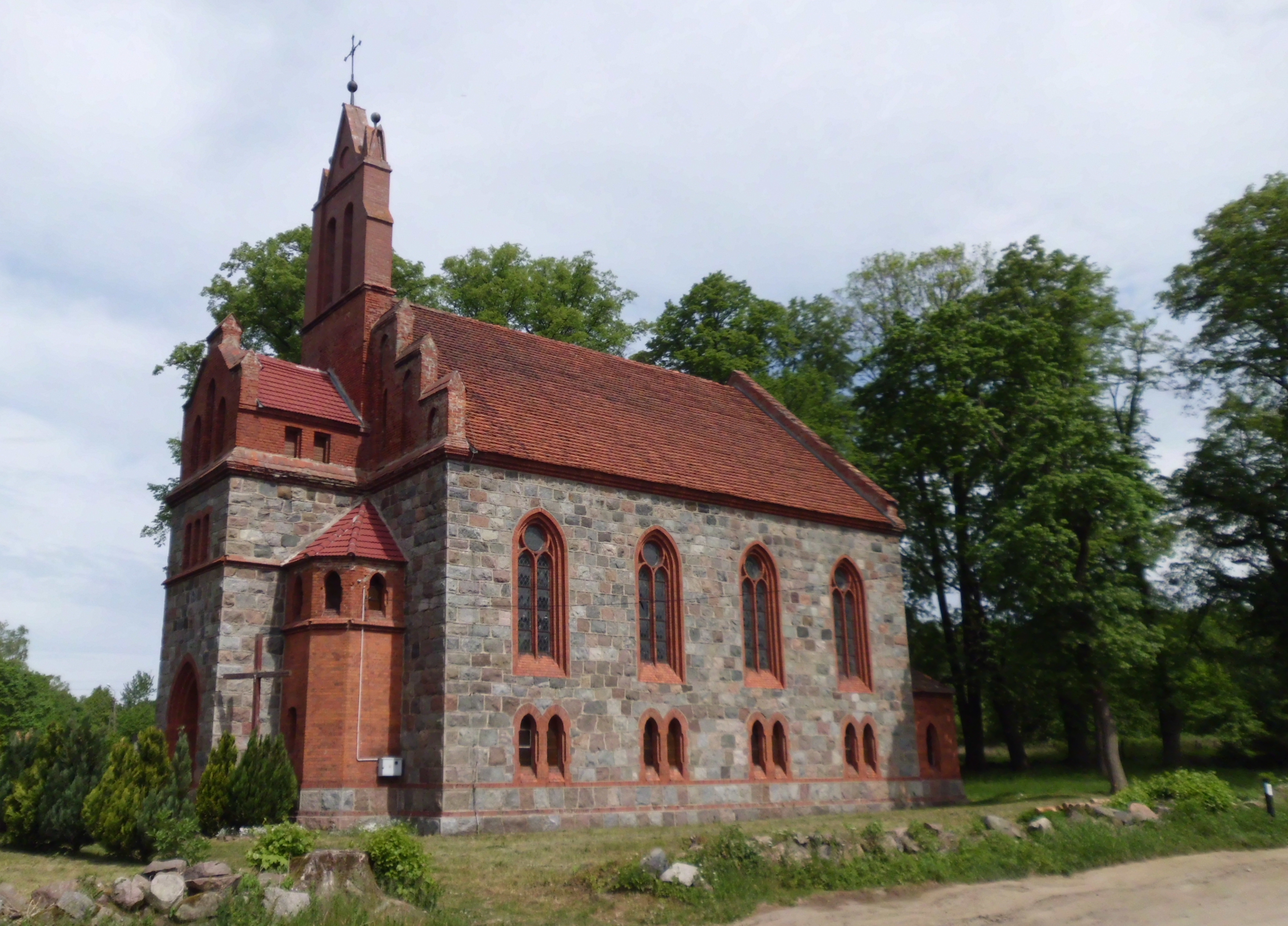 Kurowo - dawny kościół ewangelicki, obecnie rzymskokatolicki filialny p.w. Bożego Ciała